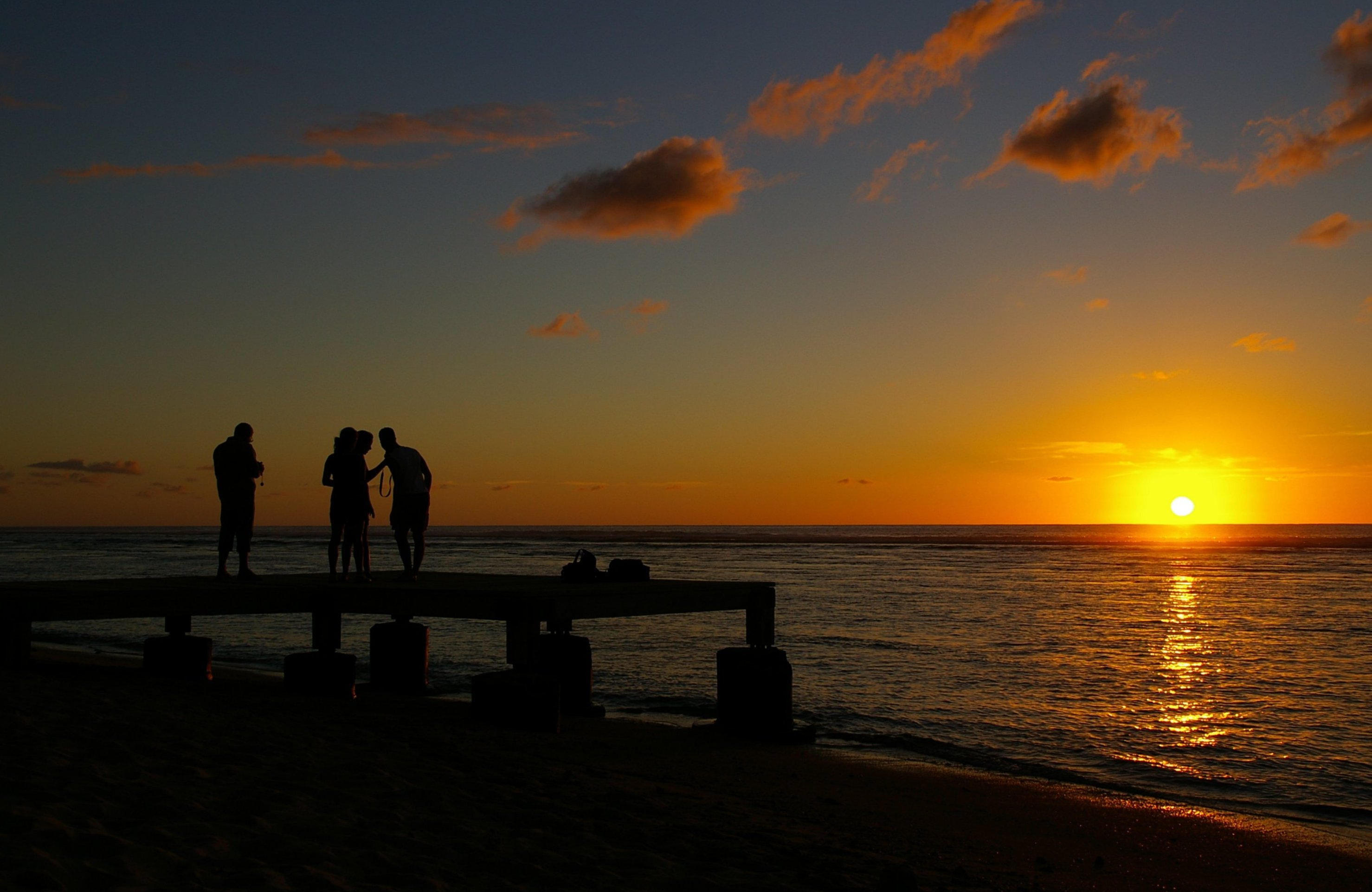 Des touristes prenant des photos du coucher de soleil sur une petite jetée de la côte ouest de l'île de La Réunion.